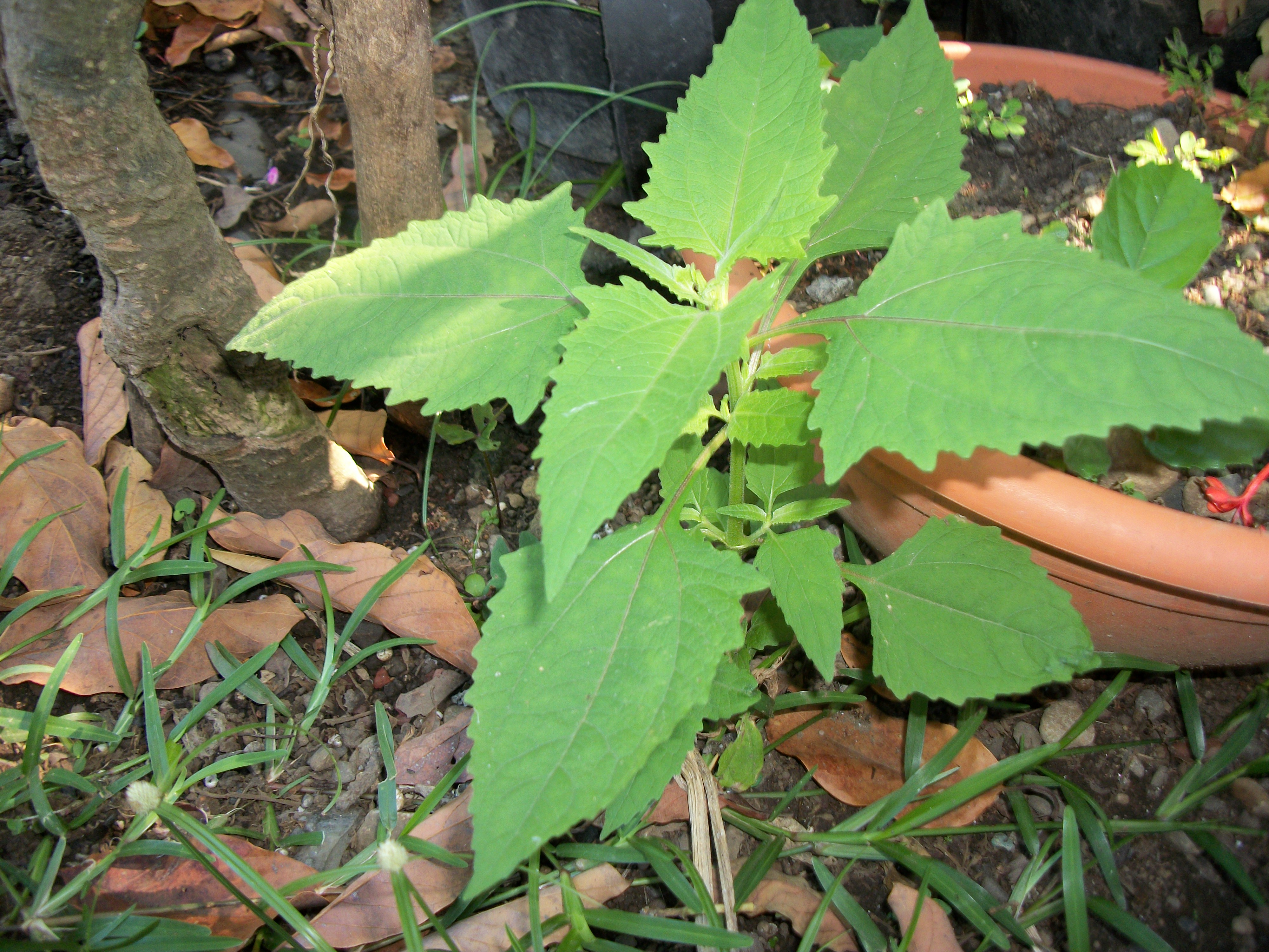 Il s'agit d'un zoom sur une feuille d'herbe saint-paul.